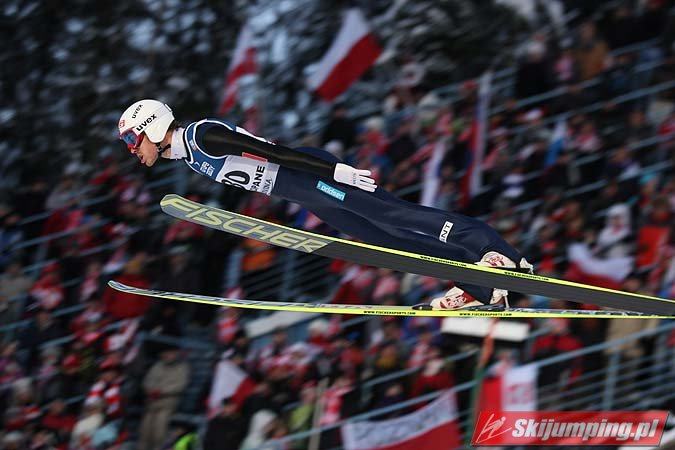 Puchar Świata w Zakopanem 2012/2013 – konkurs indywidualny (12 stycznia 2013)